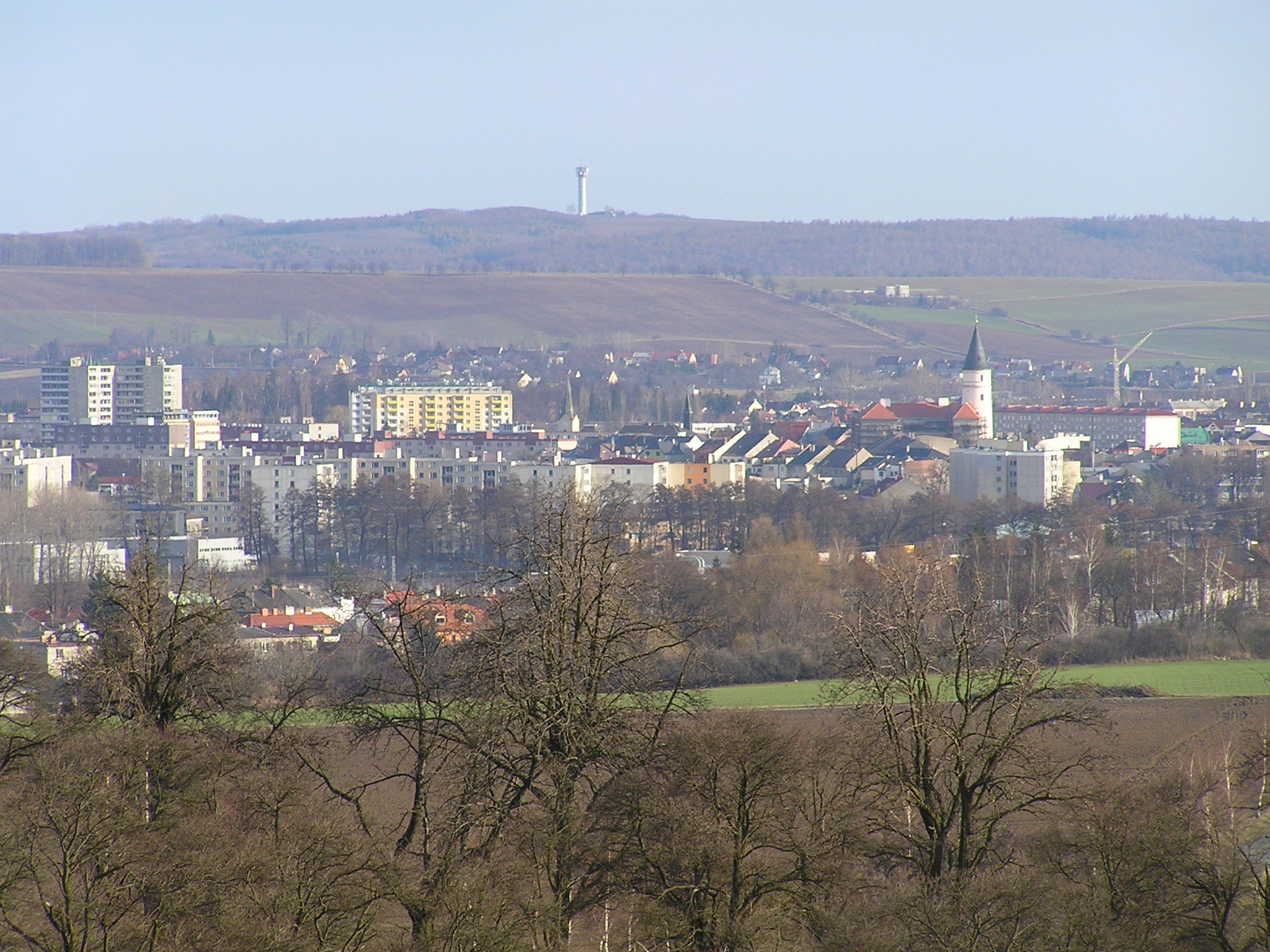 Přerov z Čekyňského kopce Fotograf: Tomáš Kolařík